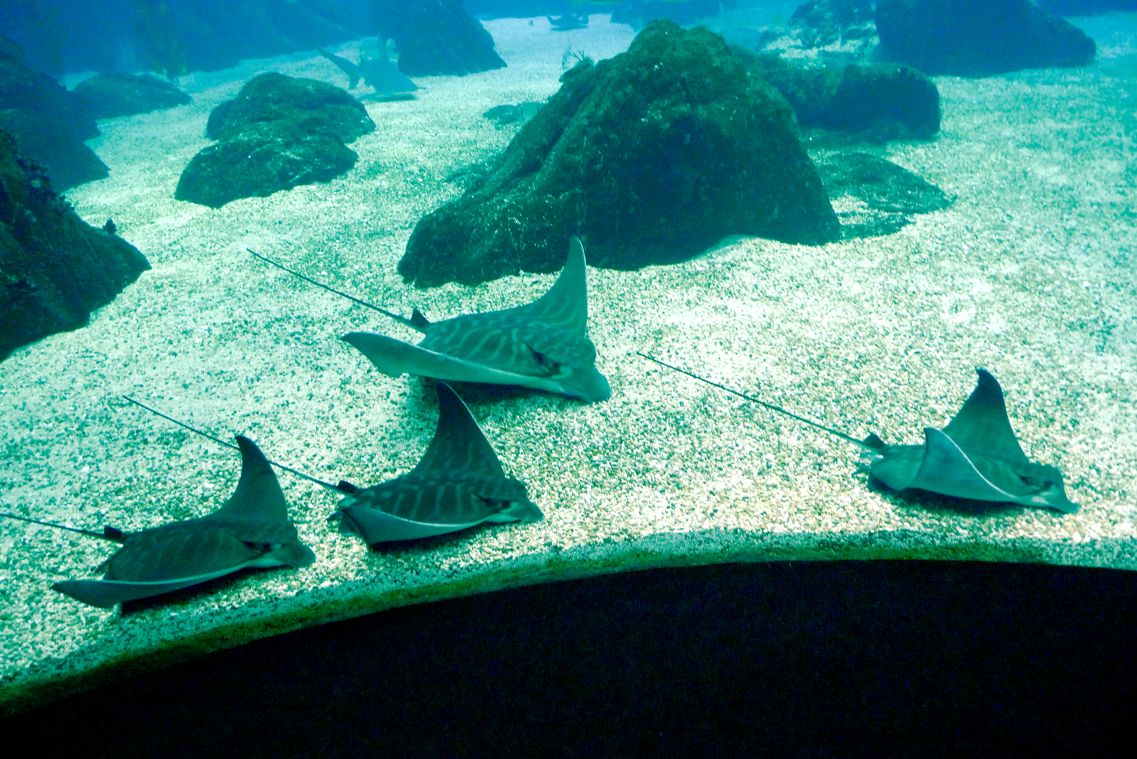 Gestreifter Adlerrochen (Pteromylaeus bovinus)